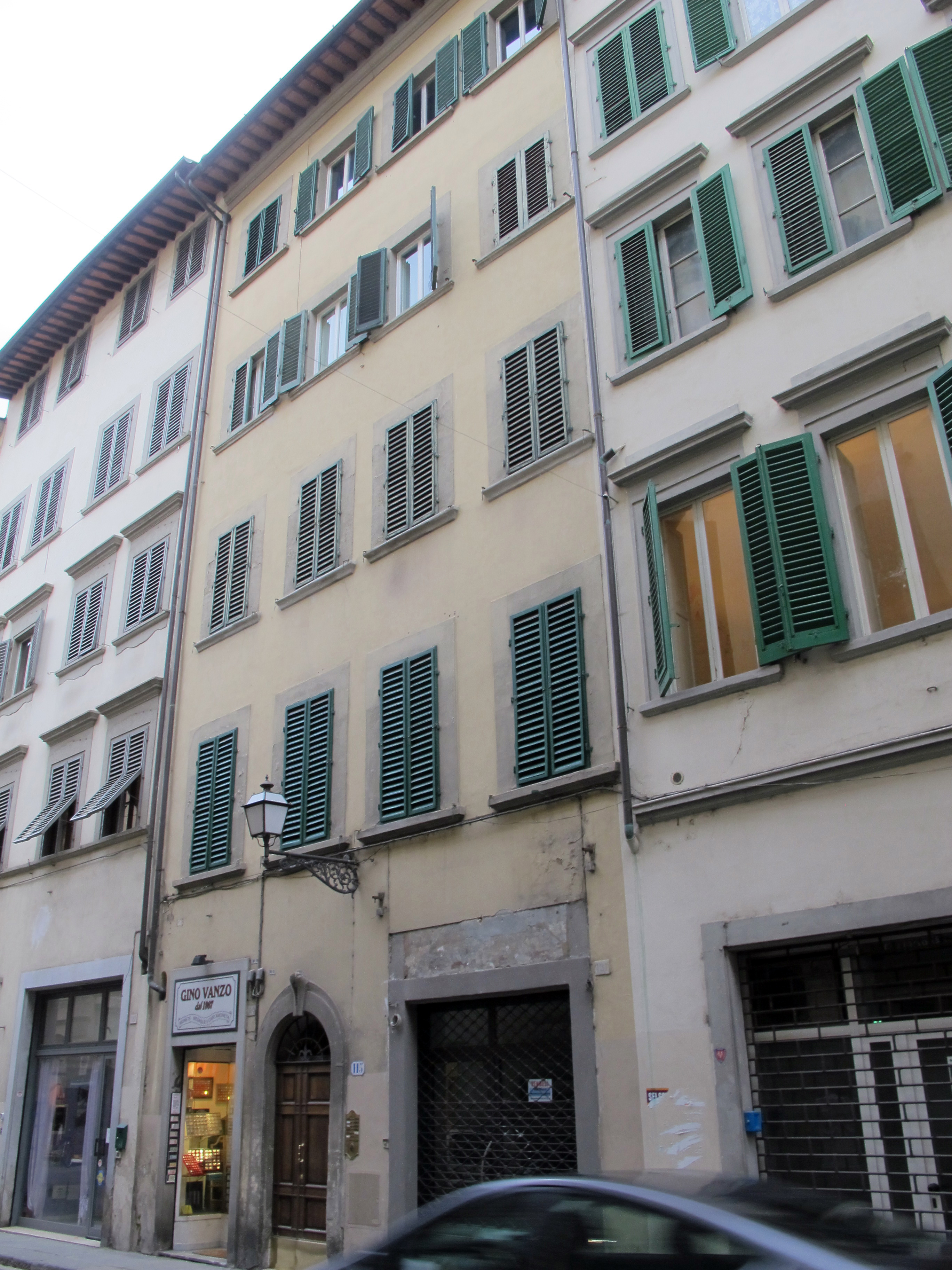 Casa di Giovanni papini a Firenze, descritta da Ettore Allodoli